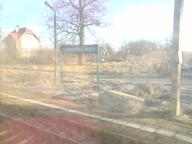 Peron w Dąbrówce Malborskiej